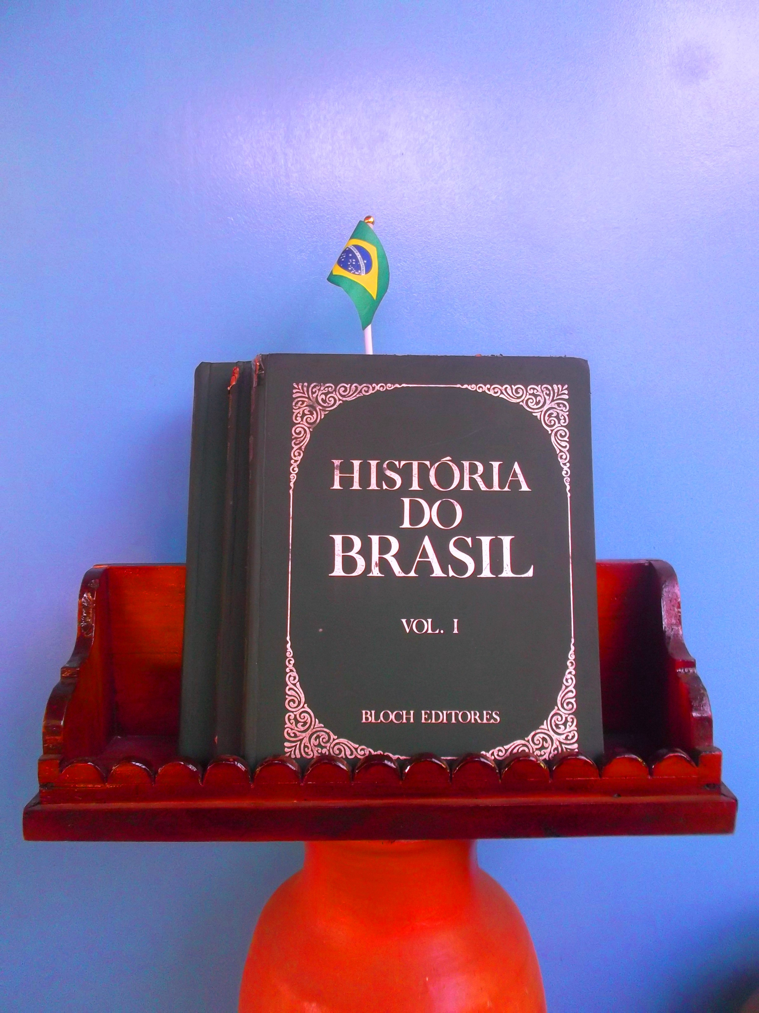 Enciclopédia de História do Brasil, da editora Bloch Editores, edição de 1972, em exposição numa biblioteca pública.